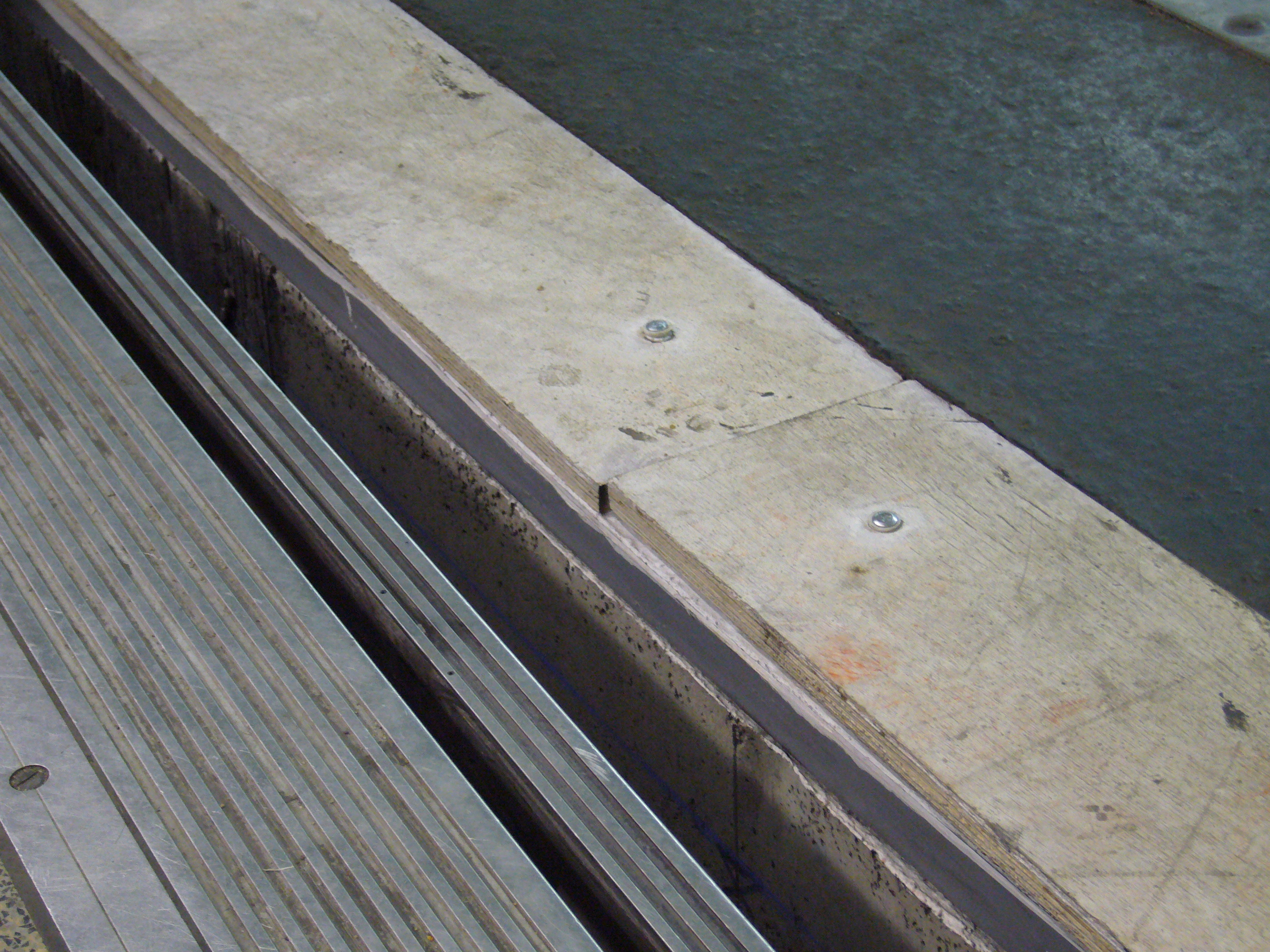 Le quai rehaussé de la station Porte de Vincennes dans le cadre de l'automatisation de la ligne 1 du métro de Paris. La hauteur de l'ancien quai est encore bien visible. La planche de bois sera remplacée par le système de porte palière.